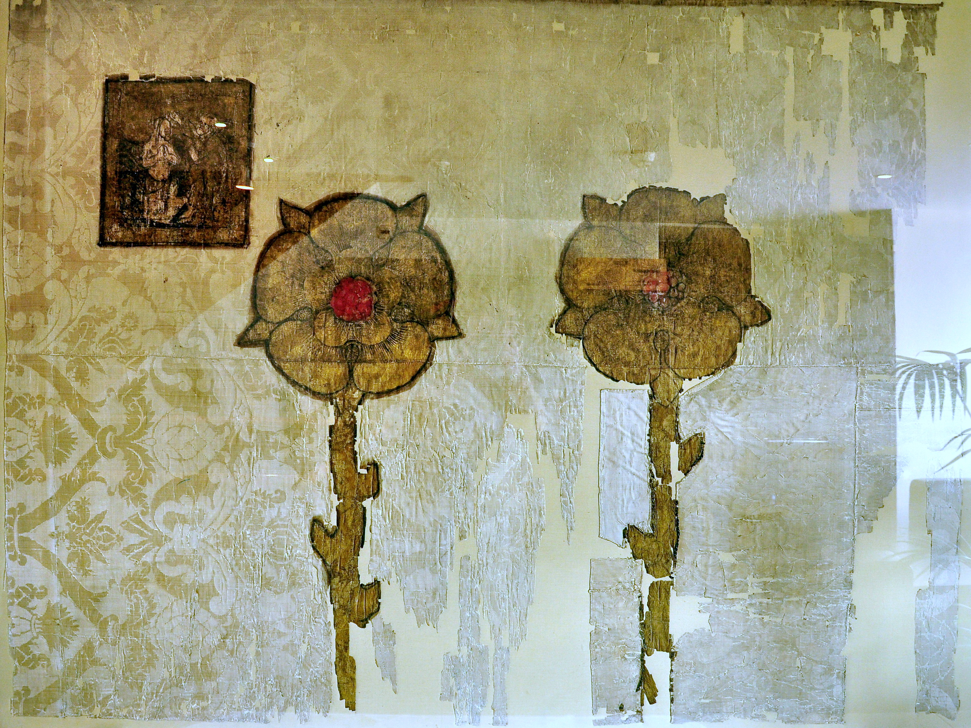 Juliusbanner der Stadt Rapperswil (1512)Eidgenössische Soldkrieger des Papstes Julius II. hatten im sogenannten «Grossen Pavierfeldzug» 1512 einen schnellen Sieg über die in der Lombardei eingebrochenen Franzosen errungen. Die mitbeteiligte Mannschaft aus Rapperswil erhielt laut Urkunde vom 24. Juni 1512 von Kardinal Matthäus Schiner ein Banner mit "verbessertem" Stadtwappen: Goldene statt rote Rosenbutzen und im Eckquartier Darstellung der Taufe Christi durch Johannes (den Täufer) mit Bezug auf das Johannes-Patrozinium der Pfarrkirche Rapperswil. Der stark geschädigte, 1895 erstmals restaurierte Seidendamast wurde 1993 auftrags der Ortsgemeinde Rapperswil im Atelier der Abegg-Stiftung Riggisberg BE neu montiert und konserviert. Dr. Bernhard Anderes, 1994.116 x 122 cm, ausgestellt im Rathaus Rapperswil, Beschreibung gemäss Beschriftung im Rathaus.